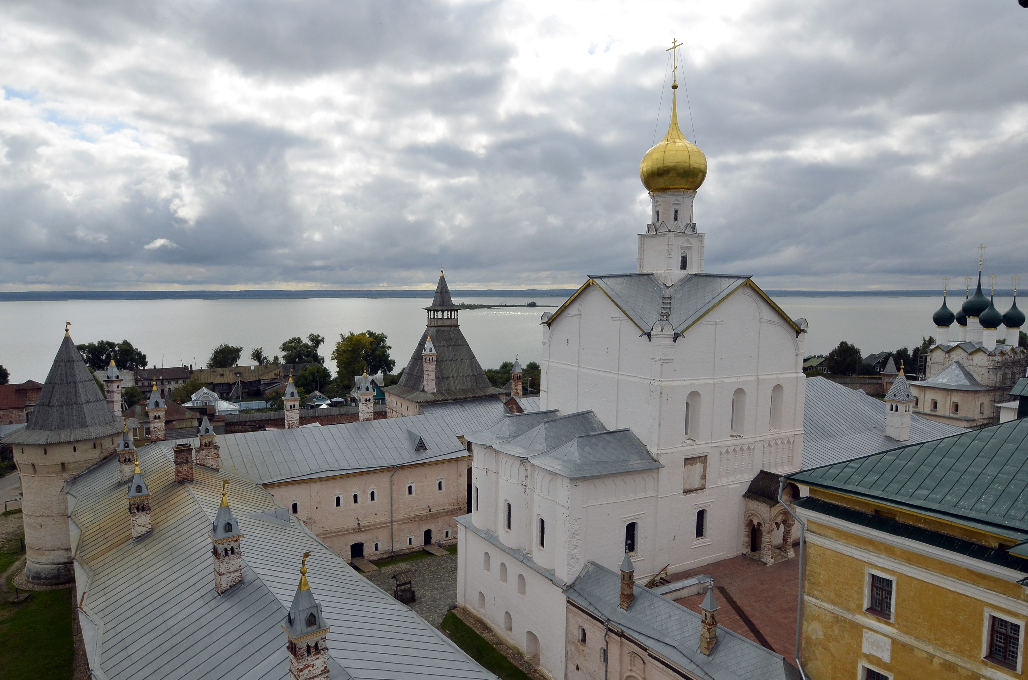 Церковь Спаса «на Сенях» (Ярославская область, Ростов, центр города)